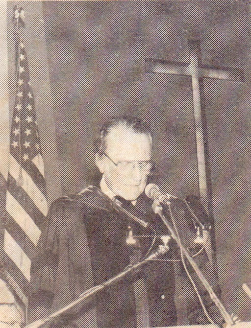 Billy Graham in Poland 1981